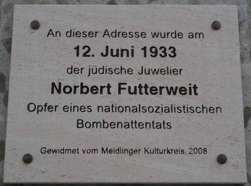 Gedenktafel für den bei einem vom Nationalsozialisten verübten Bombenanschlag getöteten jüdischen Juwelier Norbert Futterweit